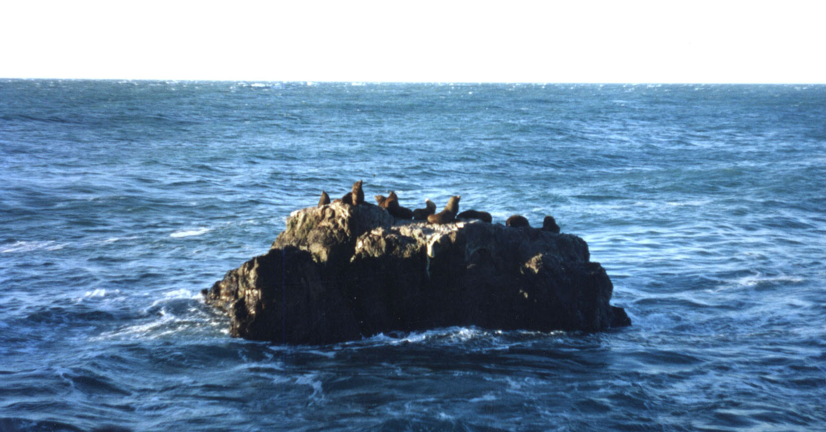 Vista de lobos marinos en Cabo Blanco (Argentina, foto del año 2000)